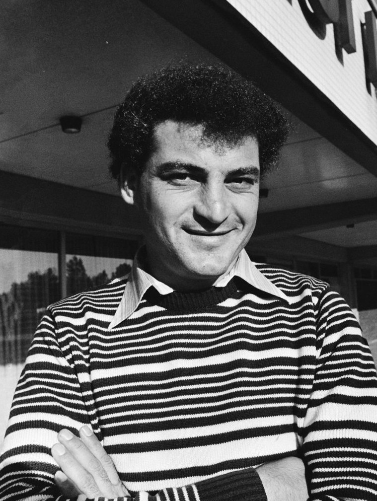 Sotiris Kaiafas is met zijn club Omonia Nicosia in Amsterdam om tegen Ajax te spelen.